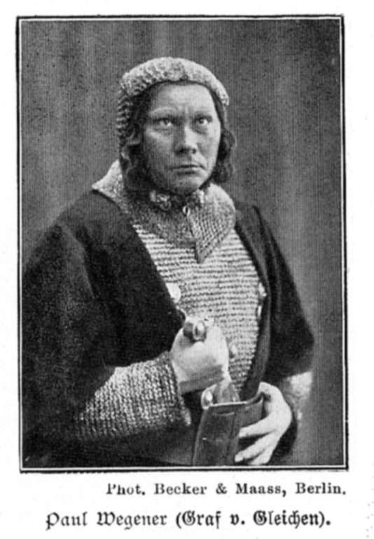 Paul Wegener. Aus Spemanns goldenes Buch des Theaters (1902). Scan --Goerdten 22:00, 4. Feb. 2007 (CET)